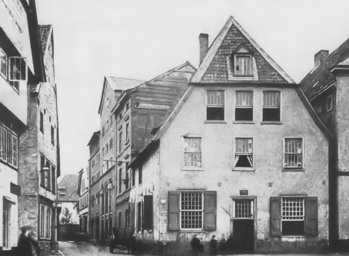 Deutschland, Dortmund, Alter Markt, Die alte Krone um 1860, Stammhaus der Kronenbrauerei, das hohe Gebäude im Hintergrund war die ehemalige Brauerei